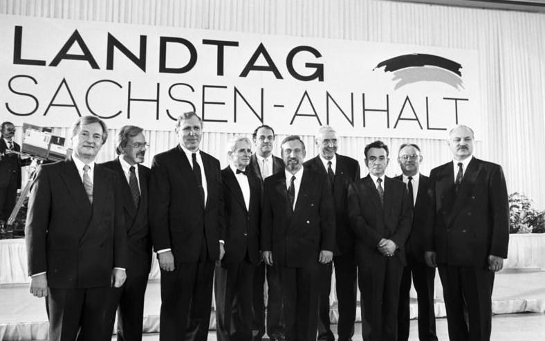 ADN-ZB / Gahlbeck / 2.11.90 / Dessau: Kabinett Die Regierung des Landes Sachsen-Anhalt. Dr. Gerd Gies mit seinem Kabinett wurde vom Landtag in Dessau bestätigt. v.l.: Dr. Horst Rehberger (FDP/Wirtschaft), Werner Schreiber (CDU/Arbeit und Soziales), Prof. Dr. Werner Münch (CDU/Finaznen), Prof. Dr. Gerd Brunner (FDP/Bundes- und Europaangelegenheit), Wolfgang Rauls (FDP/Umwelt- und Naturschutz), Dr. Gerd Gies (CDU), Walter Remmers (CDU/Justiz), Wolfgang Braun (CDU/Inneres), Otto Mintus (CDU/Ernähung und Forstwirtschaft ) und Dr. Werner Sobetzko (CDU/Bildung, Wissenschaft und Kultur).